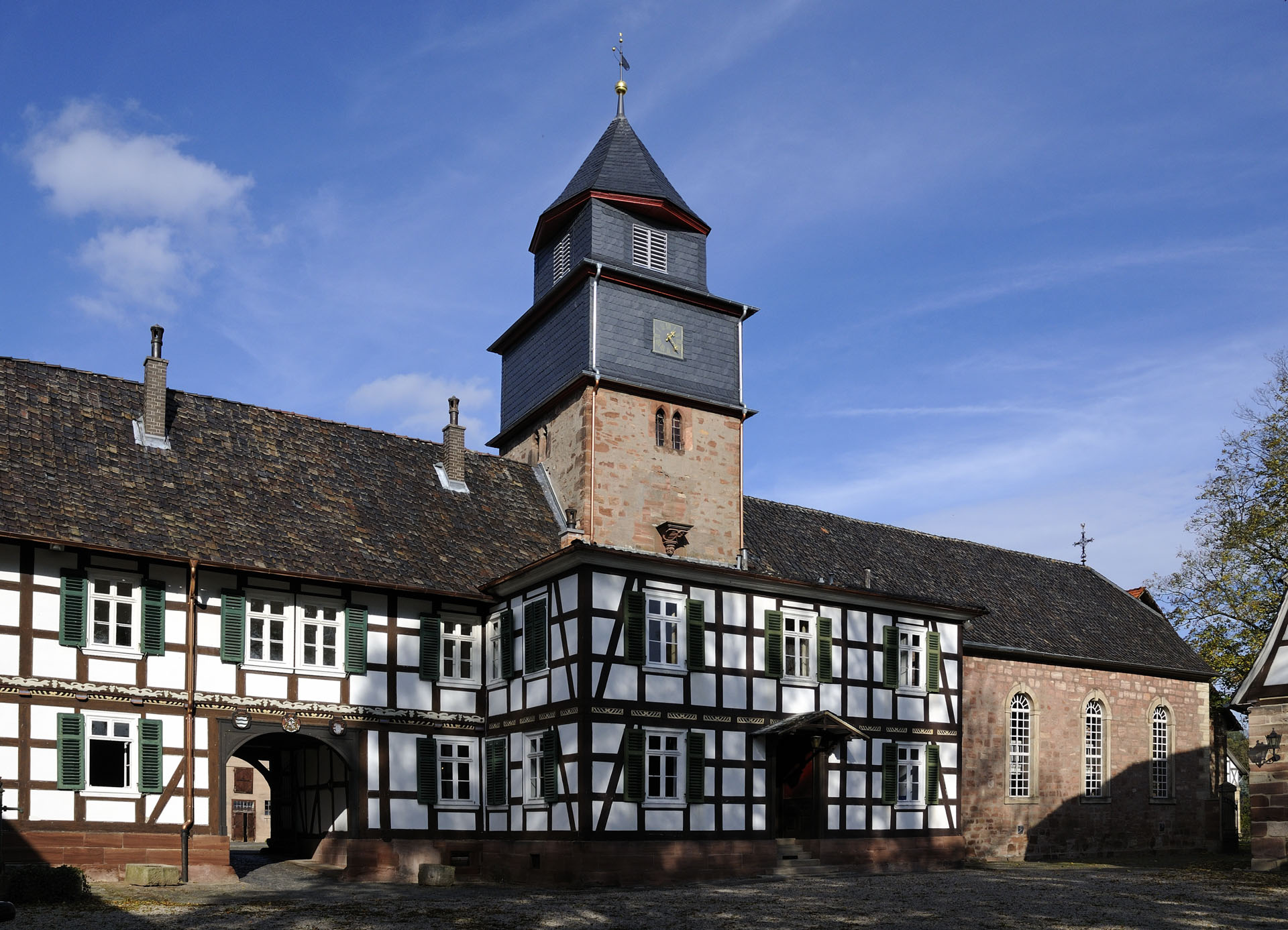 Rittergut Völkershausen ev. Kirche - Blick aus Südwest